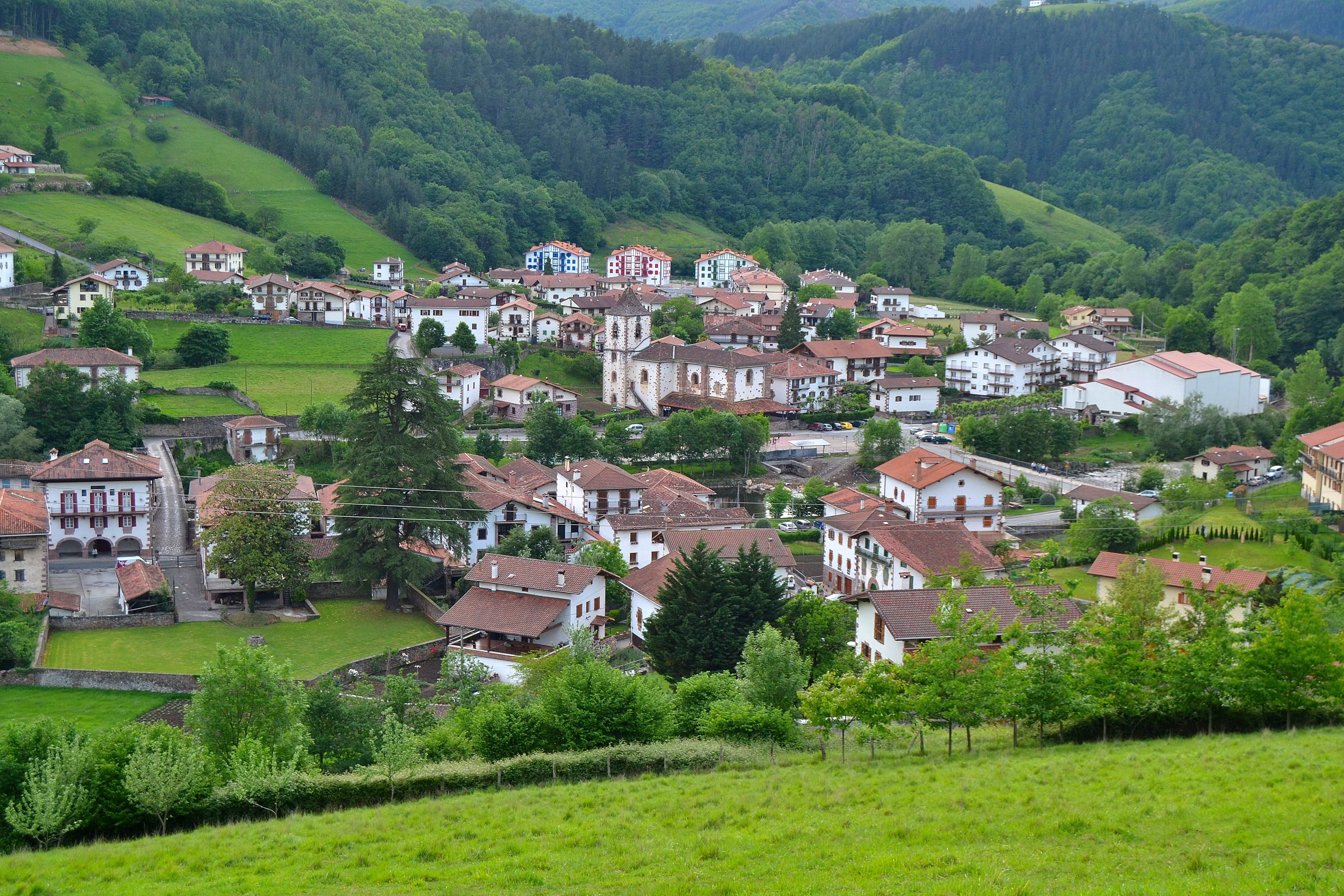 Sunbilla. Malerreka, Nafarroa. Euskal Herria. Sunbilla. Malerreka, Navarre. Basque Country.